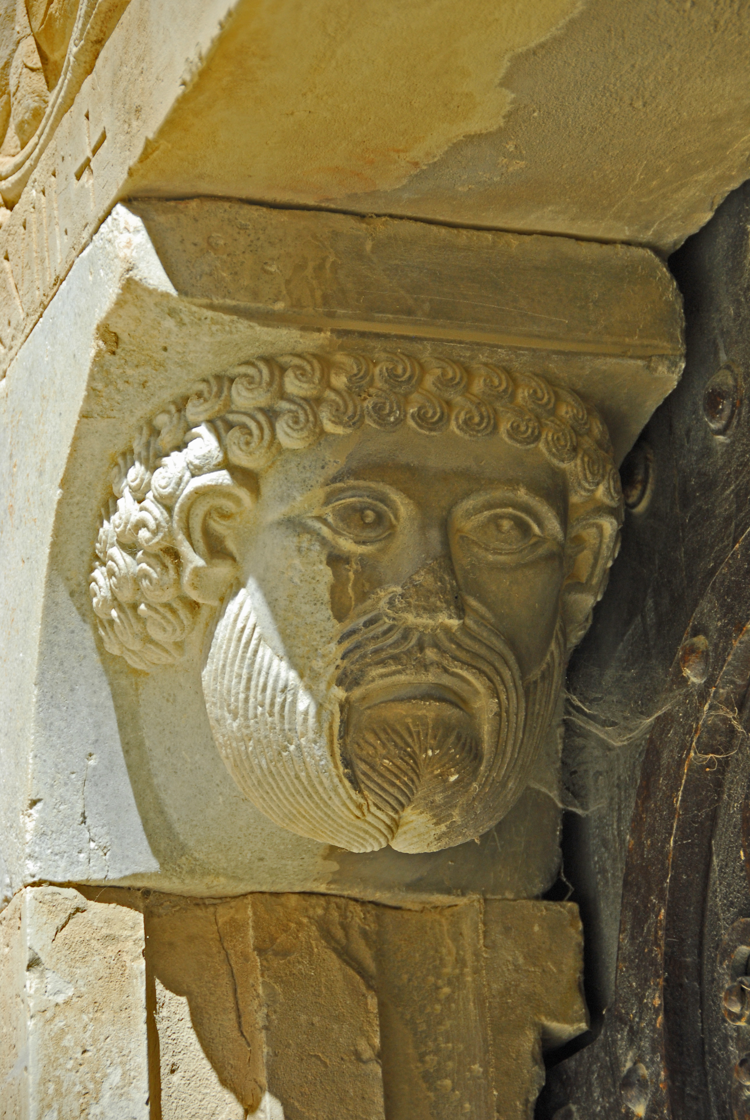 St-Pierre-et-St-Paul de Maguelone, Hauptportal, Kopfportrait Paulus